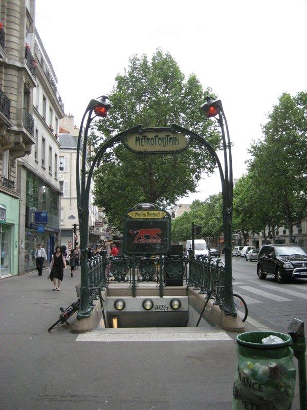 Mouton-Duvernet station entrance